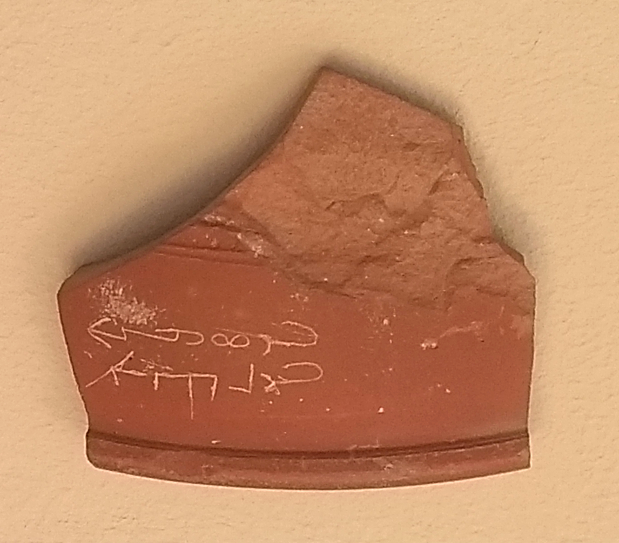 Terra-Sigillata-Scherbe aus Krefeld-Gellep, darauf ein Graffito aus aramäischen Schriftzeichen, das auf nordsyrische Händler in der Nähe des römischen Kastells Gelduba hindeutet. Übersetzung: "Barsemias, (Sohn des) Barlaha". Rheinisches Landesmuseum Bonn.